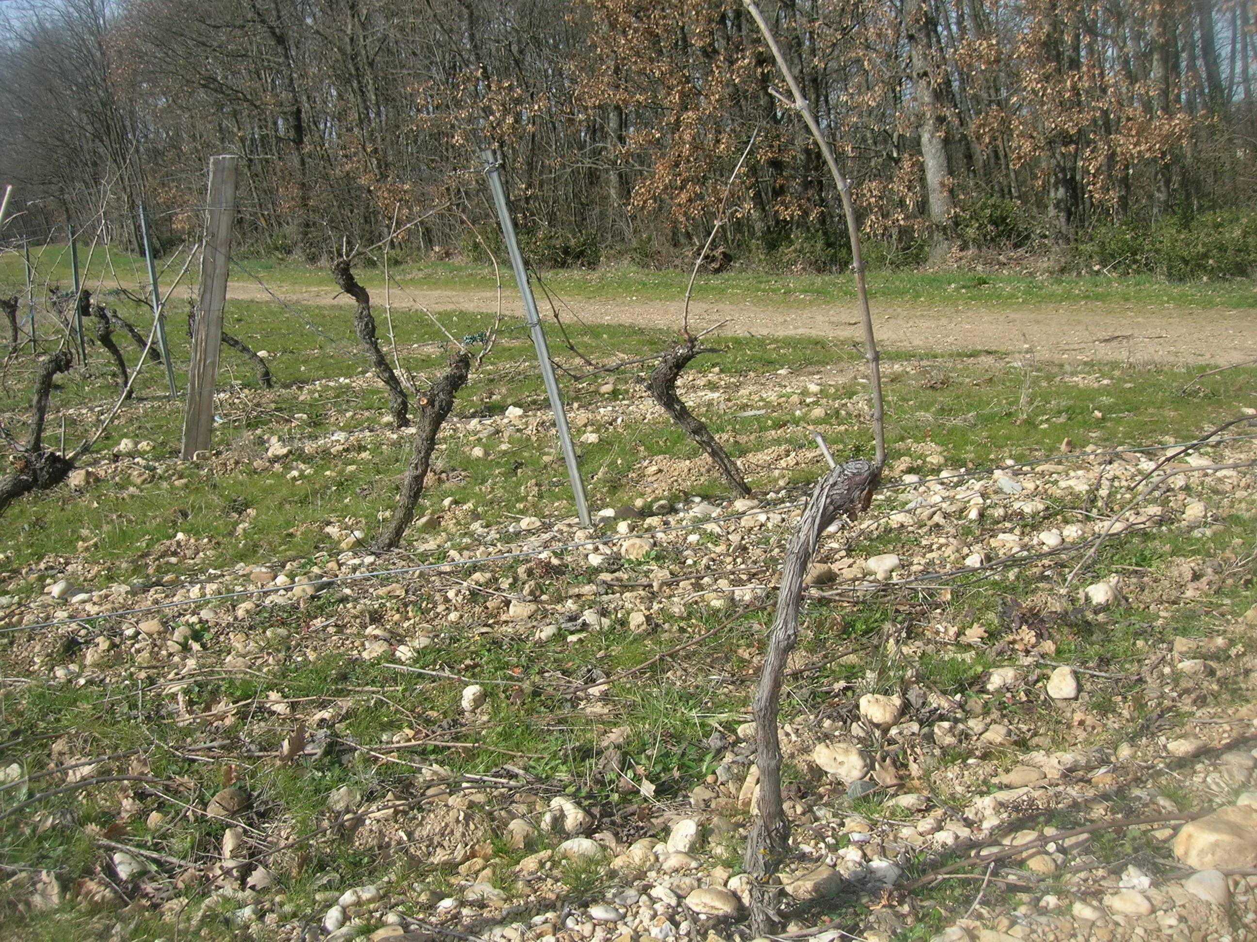 Vignoble de Gaillac, commune de Lagrave, lieu-dit les Ardurels. Terroir rive gauche. On distingue au sol les galets de la terrasse alluviale du Tarn. La vigne est taillée en guyot. Photo prise le 8 mars 2010 vers 16:00.